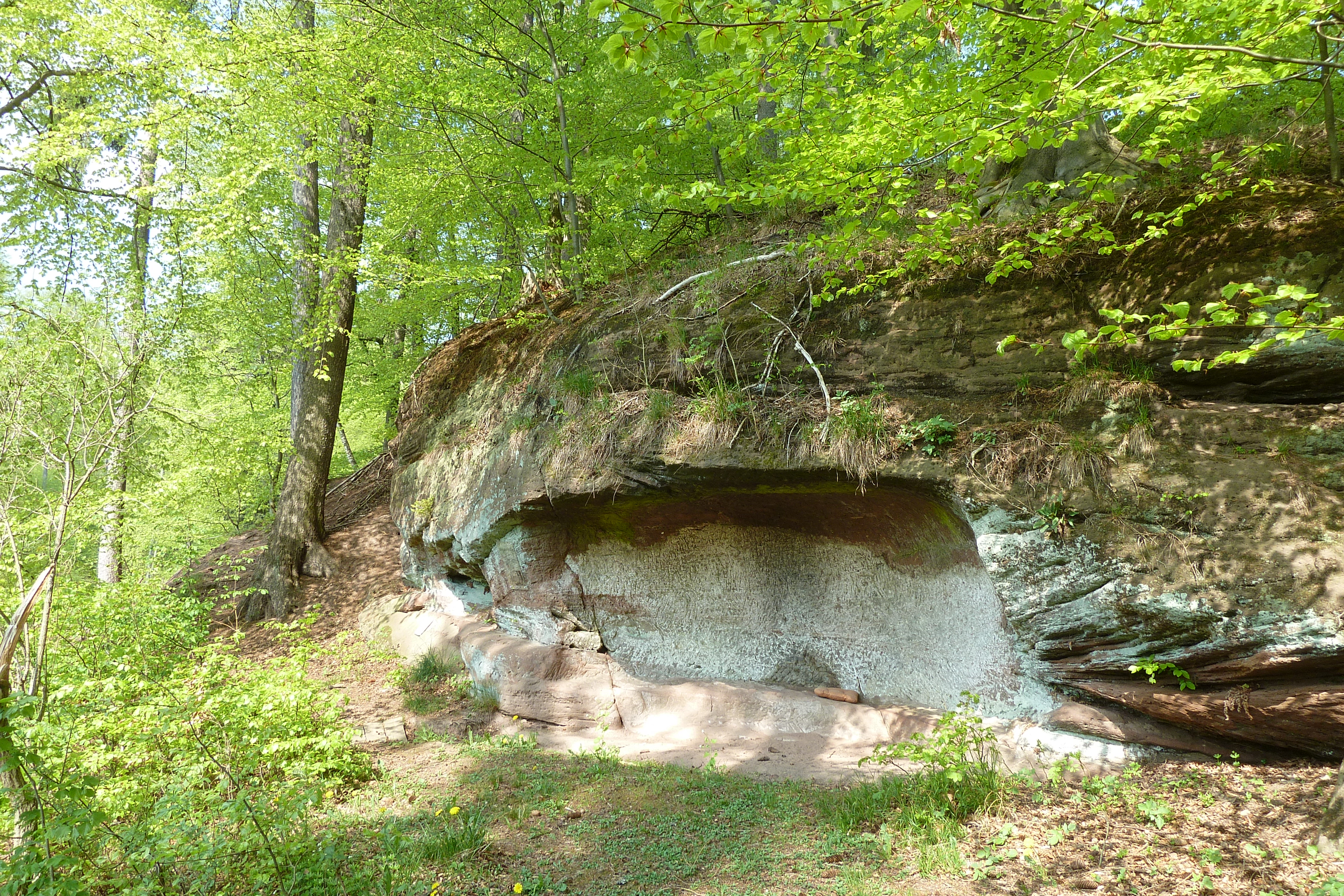 Bürgergrotte über dem Helletal bei Niedeck, Gemeinde Gleichen, Südniedersachsen. Hierher soll sich Gottfried August Bürger oft zurückgezogen haben.